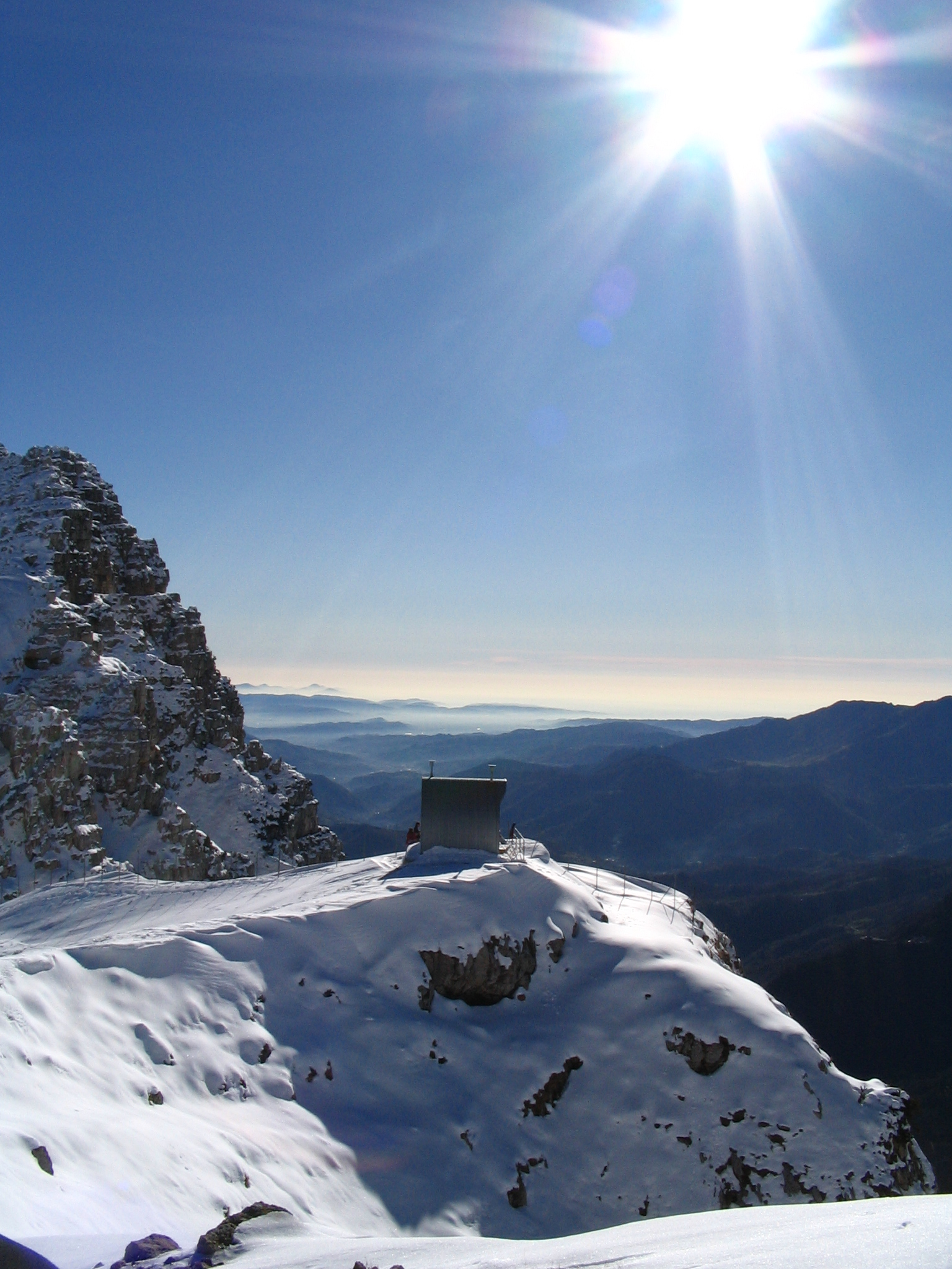 Foto scattata da Cima Palon, alle Porte del Pasubio, Prealpi Venete, Italia, che rappresenta la Val Canale e in primo piano il bivacco Marzotto-Sacchi.